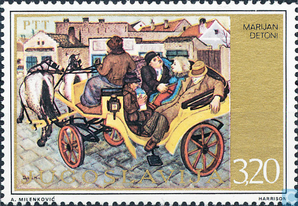 Drunk men by Marijan Detoni